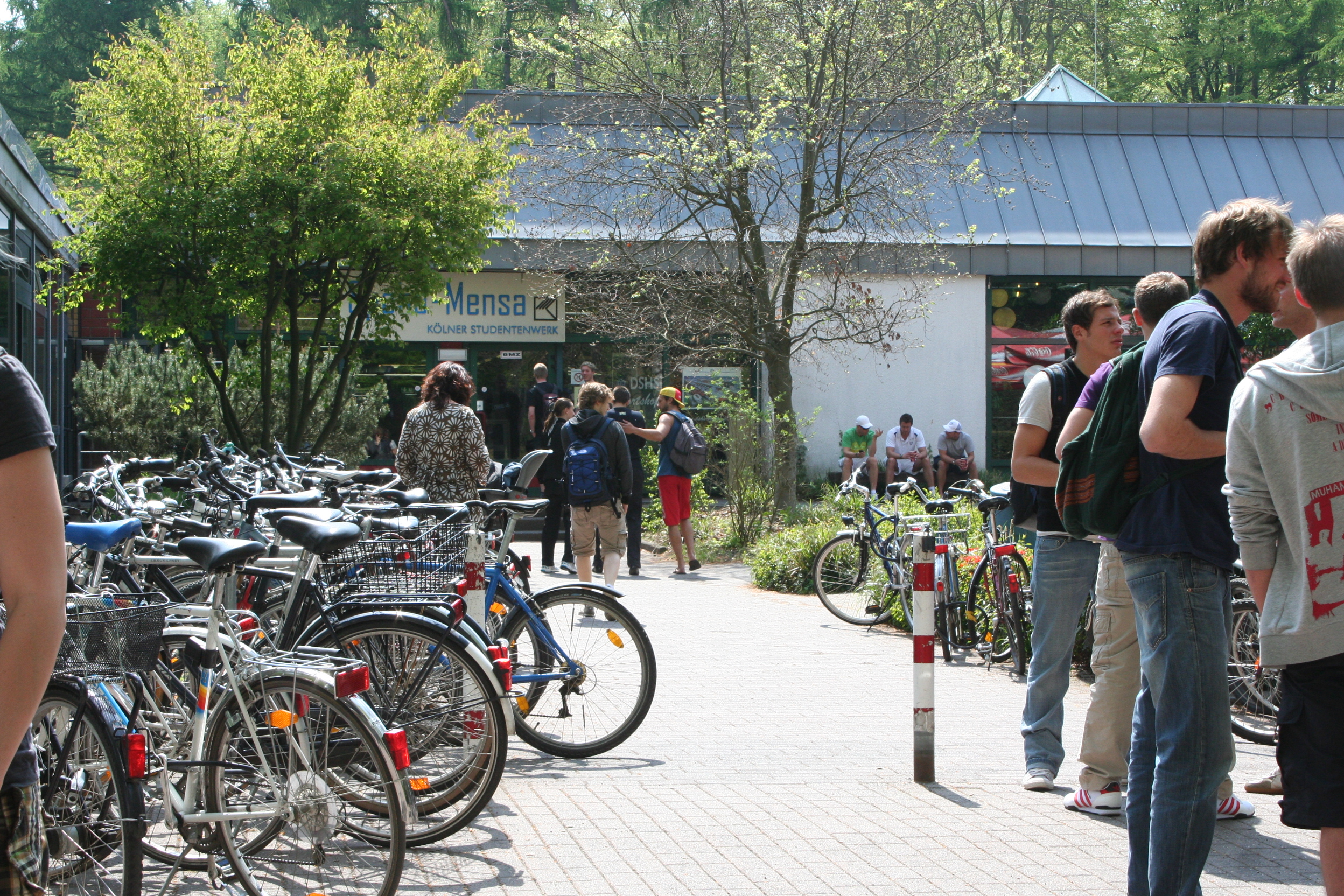 Studierende auf dem Campus der Deutschen Sporthochschule Köln